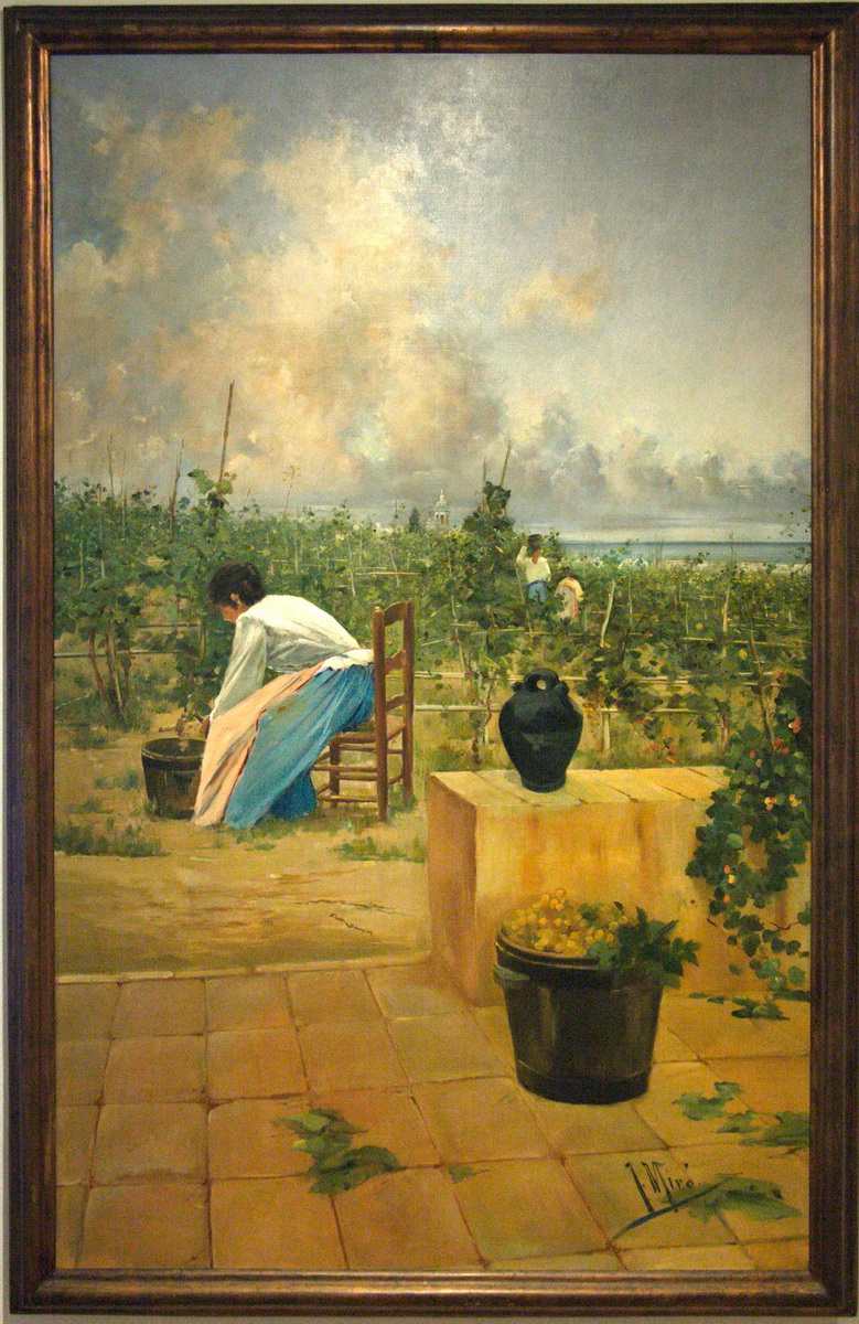 "Recol·lecció de Malvasia", obra de Joaquim de Miró i Argenter, 1895. Conservada al Museu Maricel de Sitges